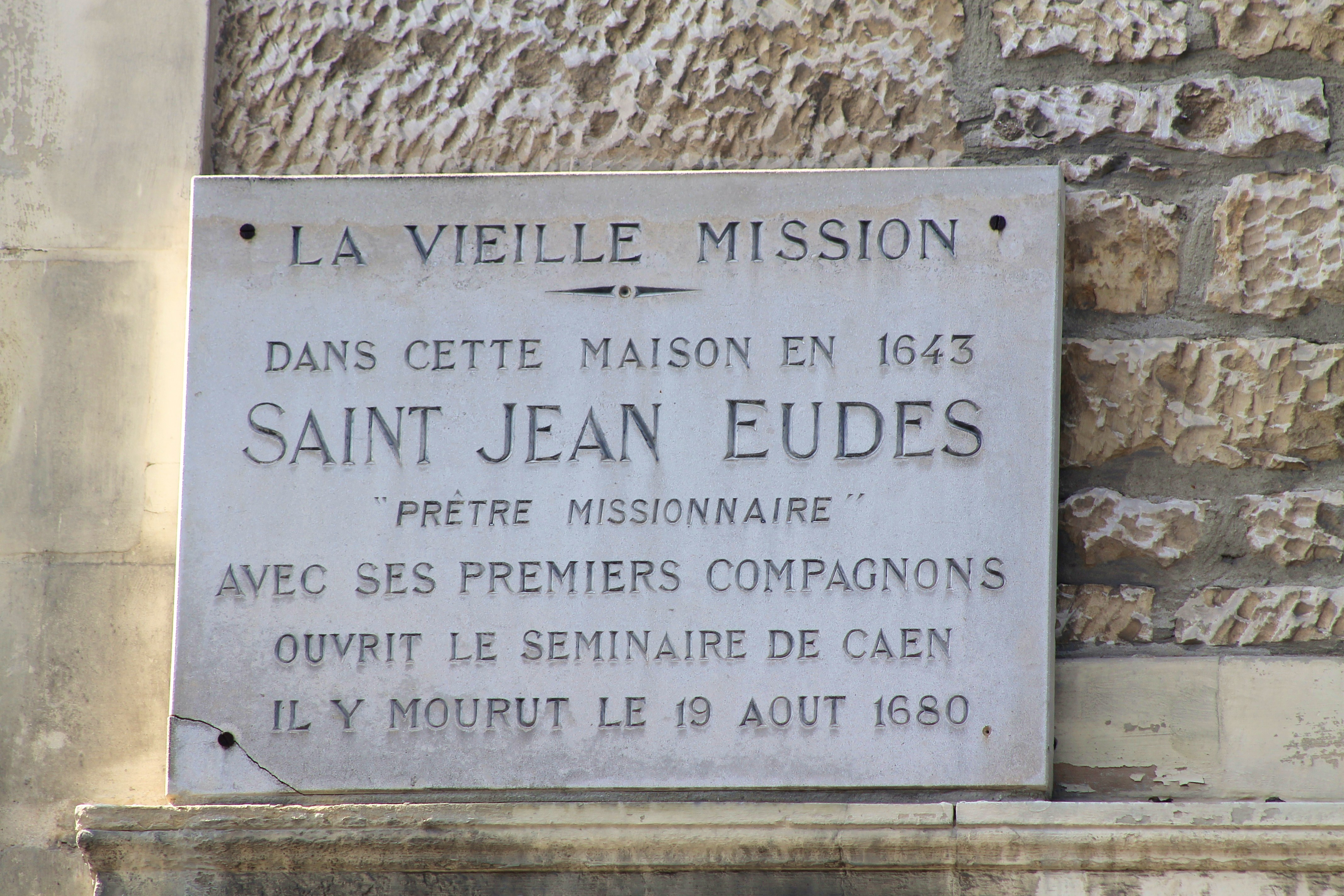 “La Vieille Mission" au 30 rue Jean Eudes à Caen (Calvados). Plaque commémorative: Dans cette maison en 1643 saint Jean Eudes "prêtre missionnaire" avec ses compagnons ouvrit le séminaire des Eudistes de Caen. Il y mourut le 19 août 1680